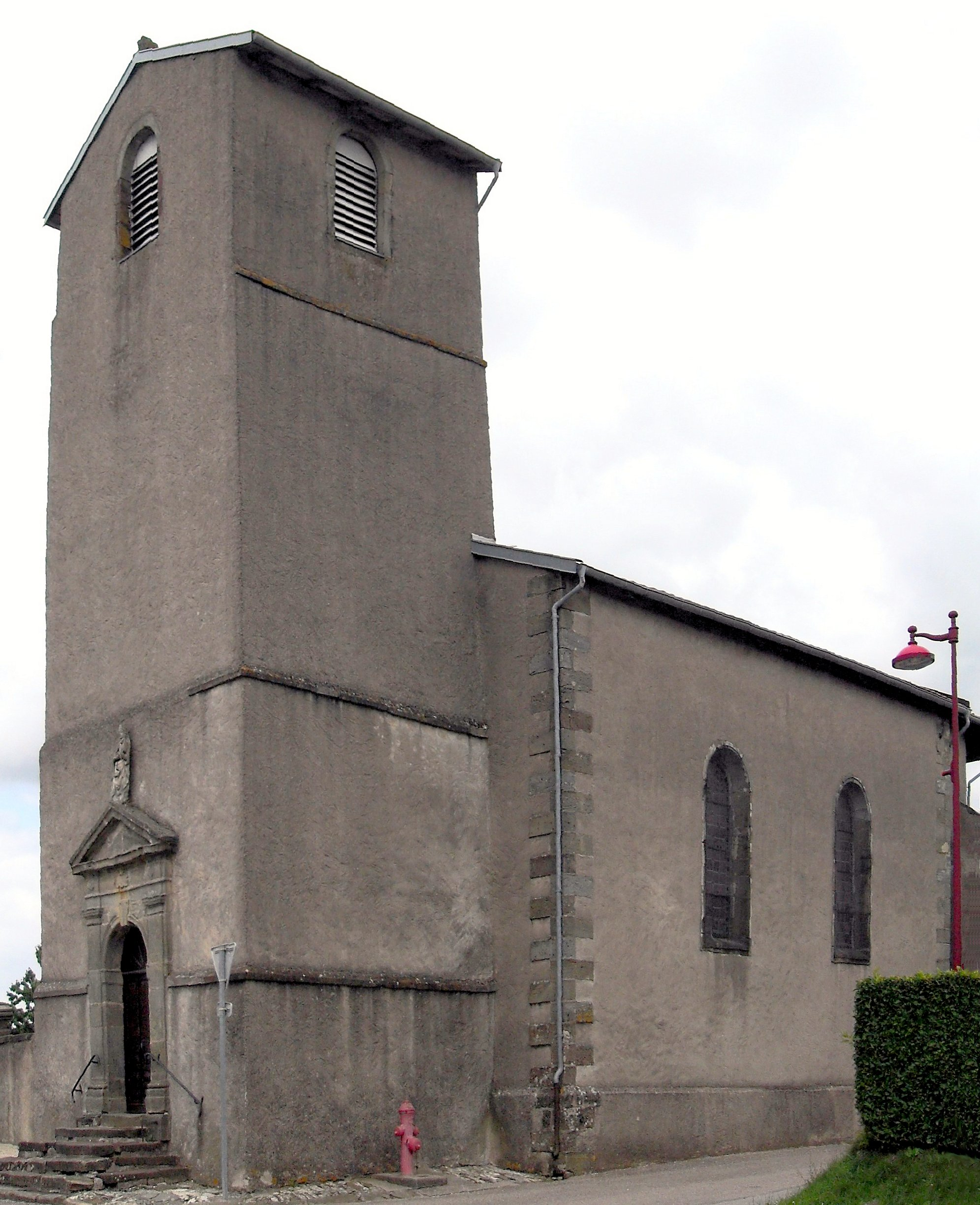 L'église Saint-Valère à Saint-Vallier